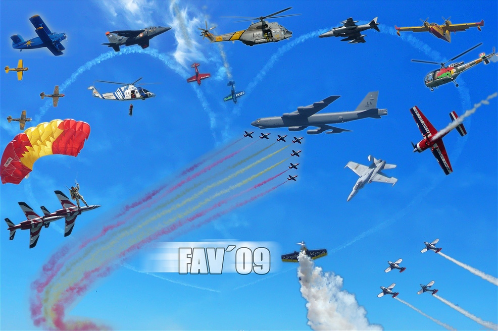 Todos los participantes del Festival Aéreo de Vigo de 2009.